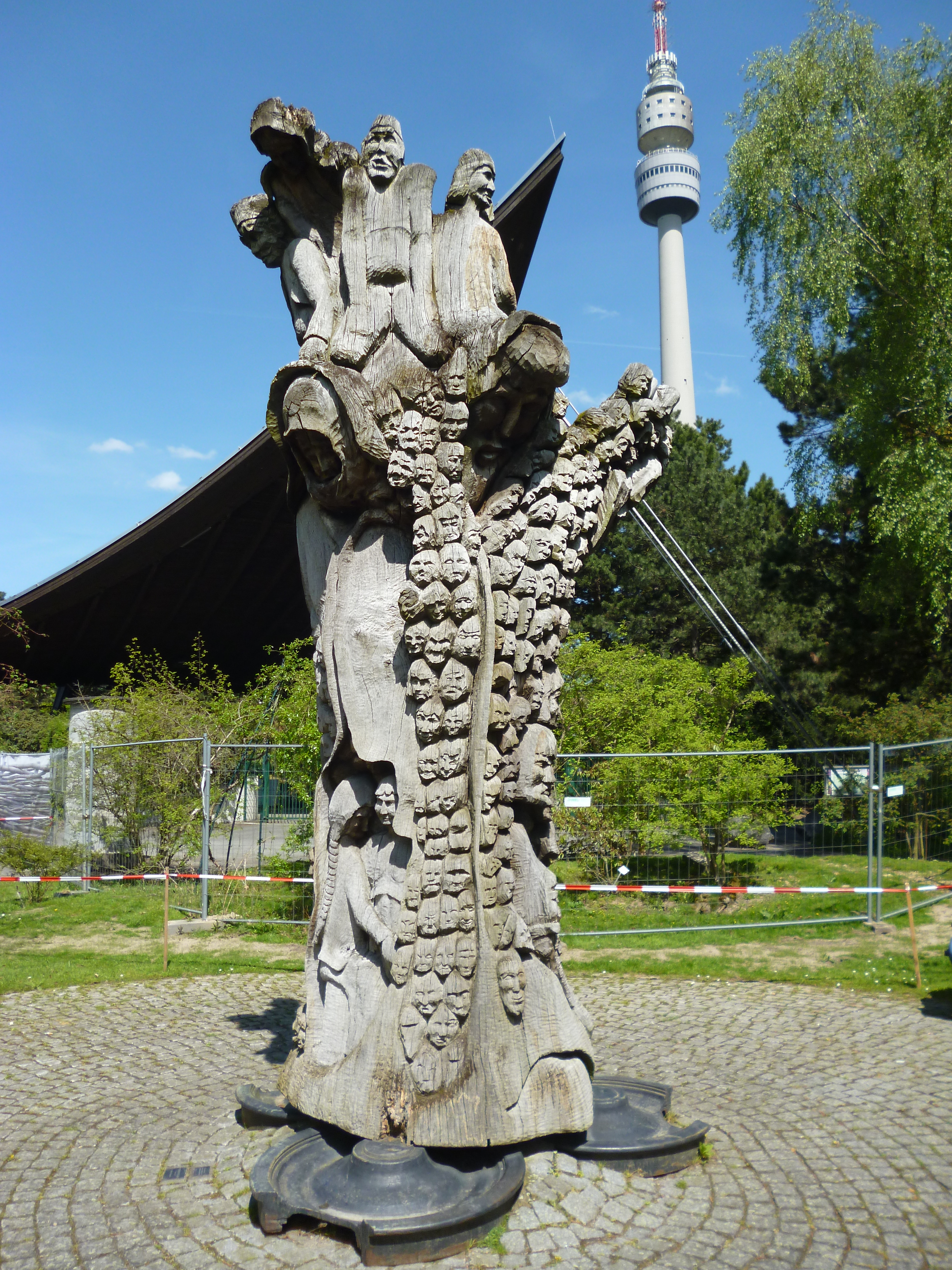 Mile Prerad: "Fundament des Lebens", 1987. Holzplastik aus einer vom Blitz gefällten Eiche geschnitzt, auf Eisenrädern. Westfalenpark, Dortmund